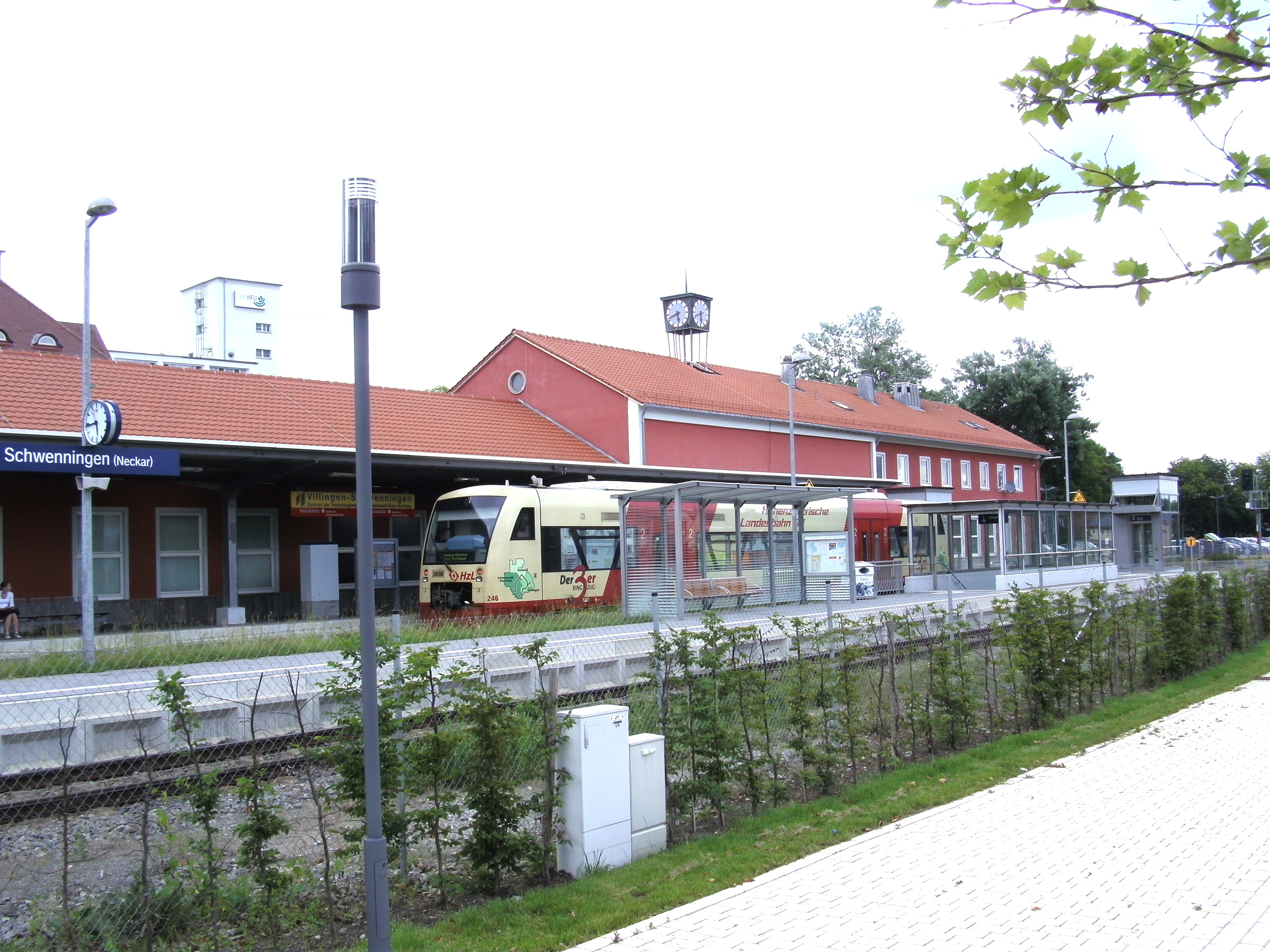 Bahnsteige des Bahnhofs Schwenningen (Neckar) mit Triebwagen des 3er-Ringzuges